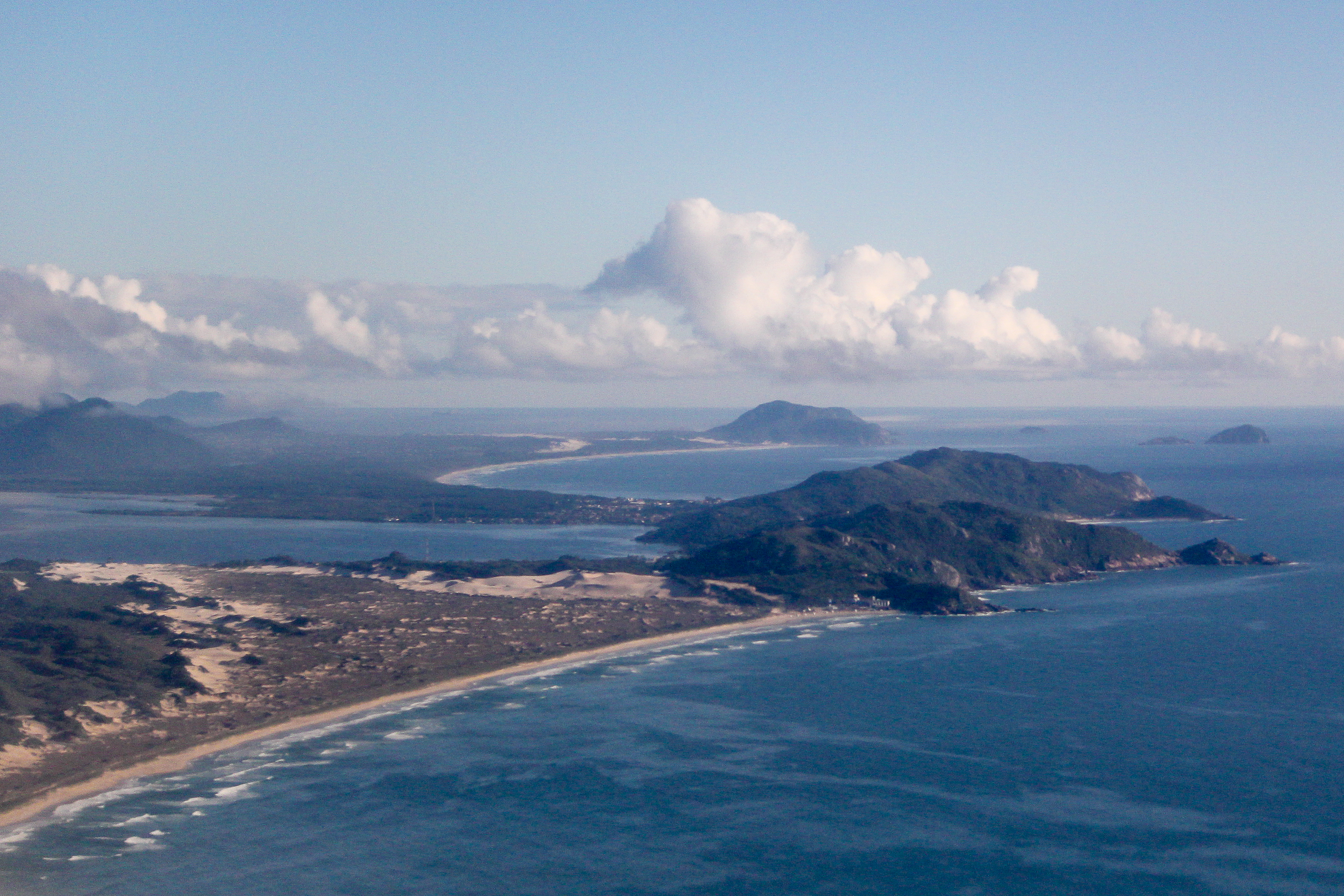 Vista aérea da parte leste da ilha de Santa Catarina